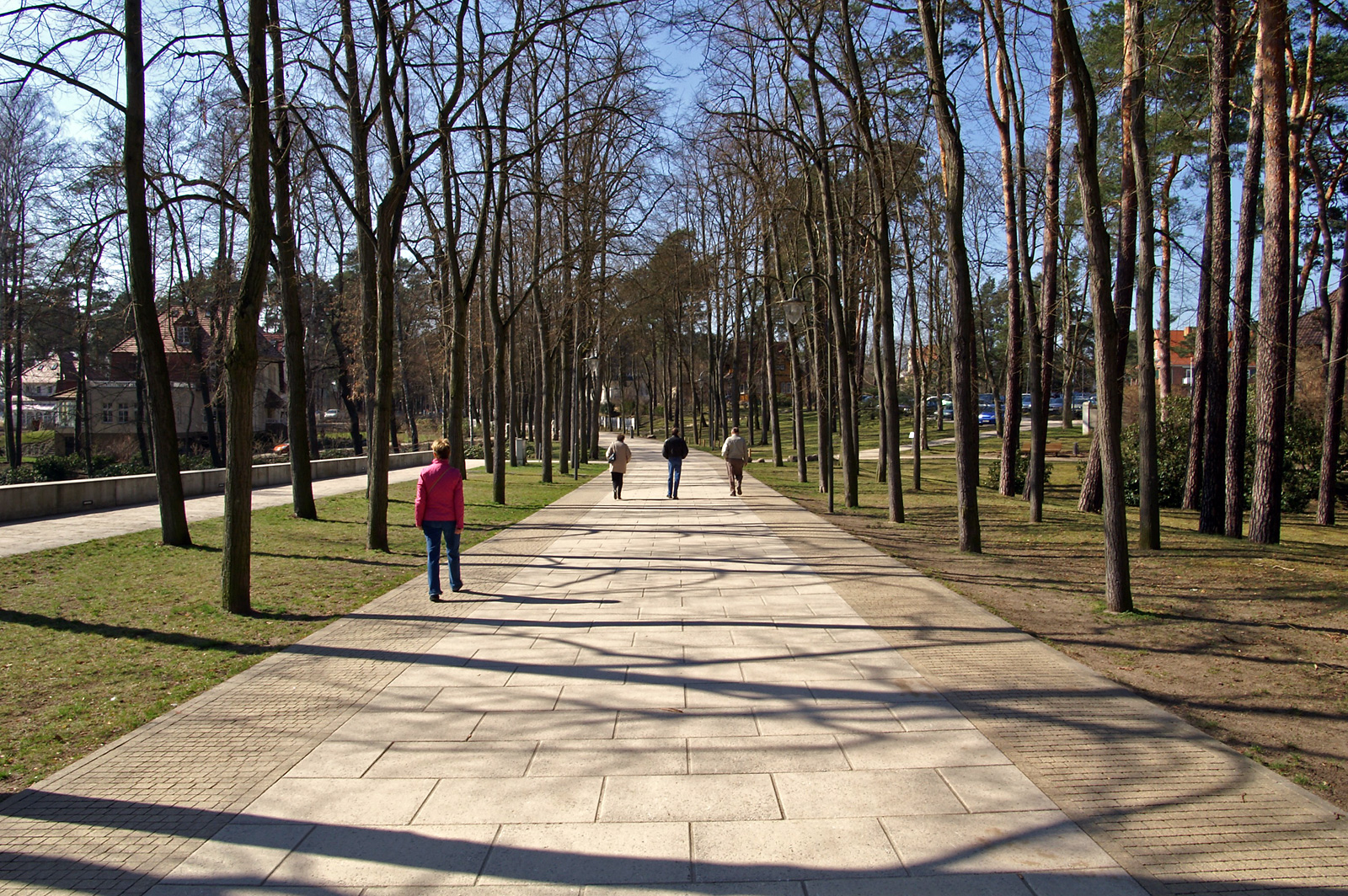 Park in Bad Saarow, Deutschland.